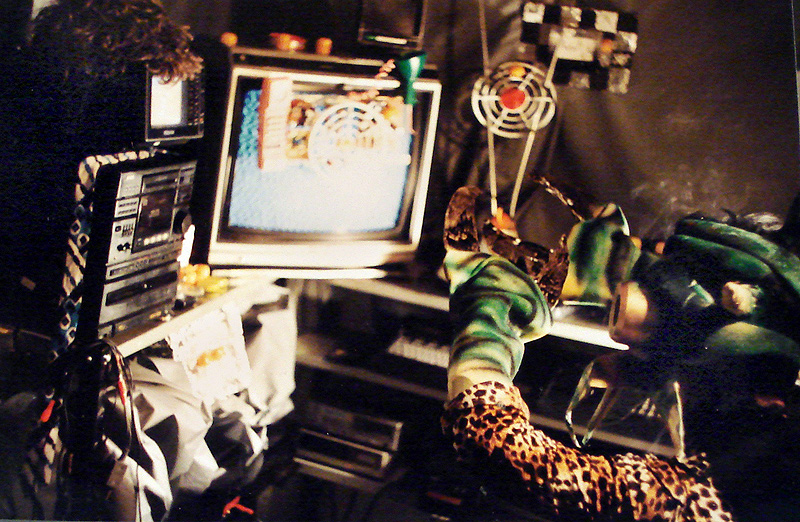 Cena do filme trash Projeto Espacial B, mostrando Diego Silveira no papel do alienígena Zoltan Gork no interior de sua nave espacial. Produção da banda Aristóteles de Ananias Jr.